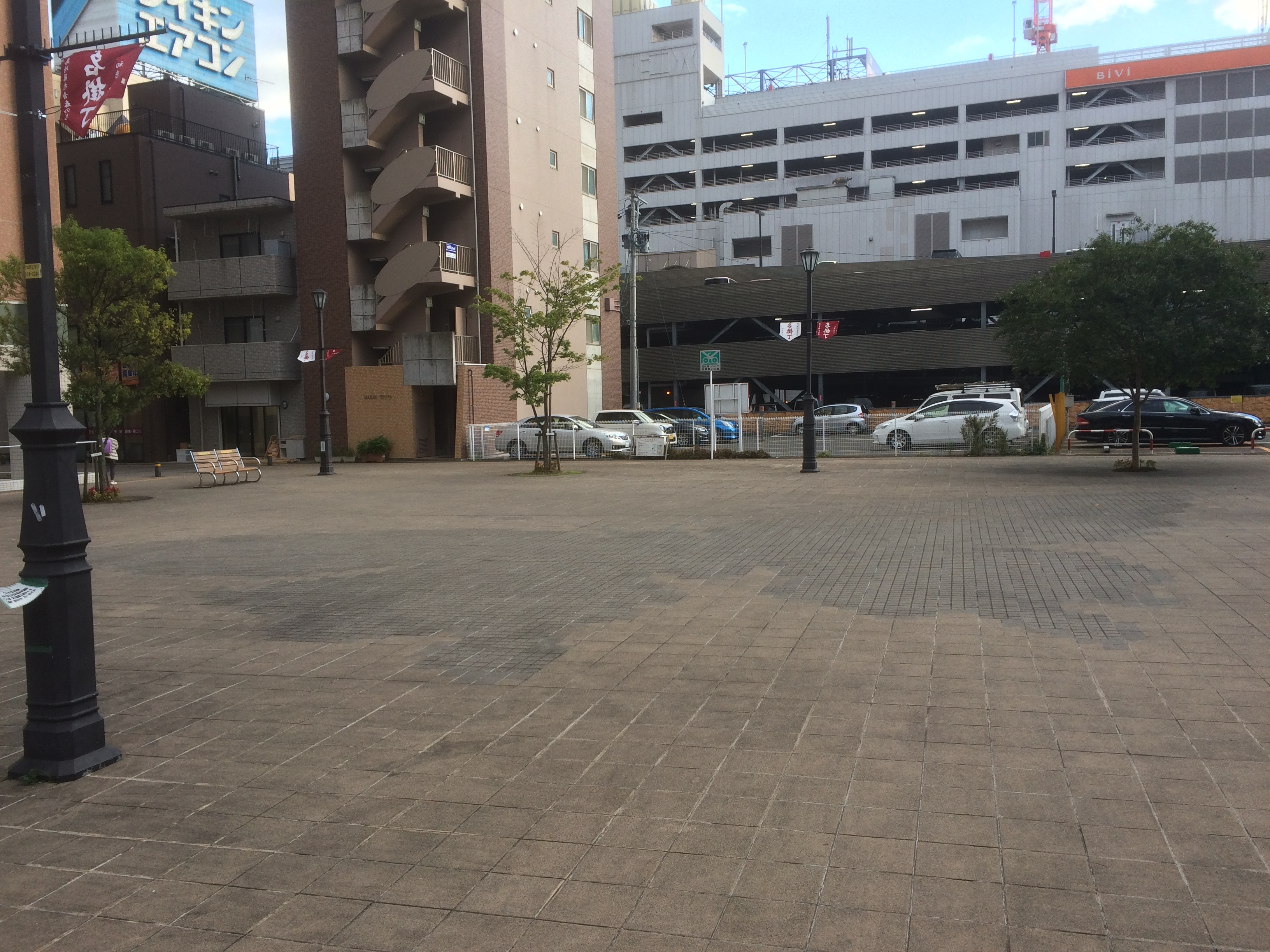 藤村広場の揚羽蝶